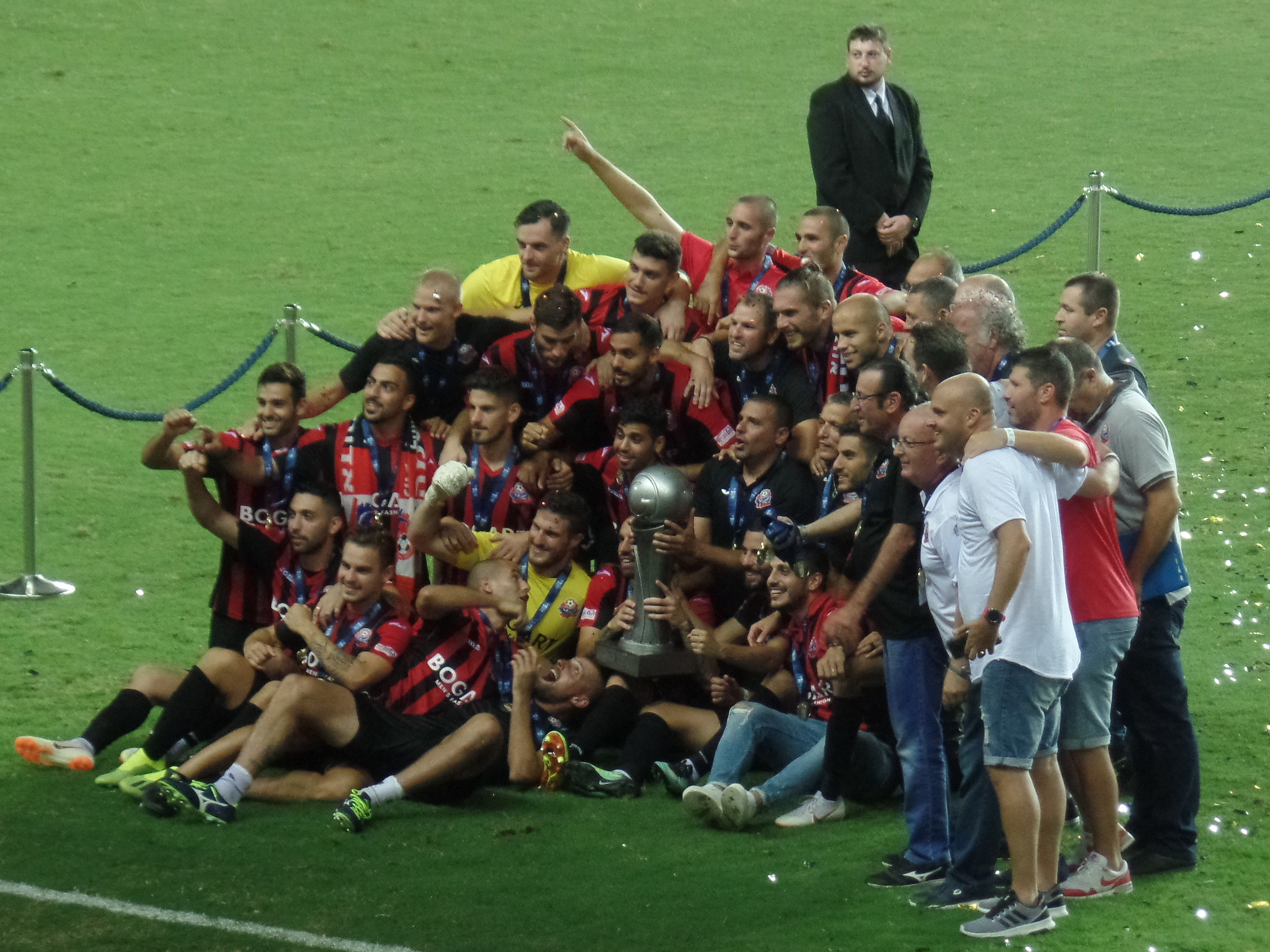 שחקני הפועל חיפה חוגגים את הזכיה